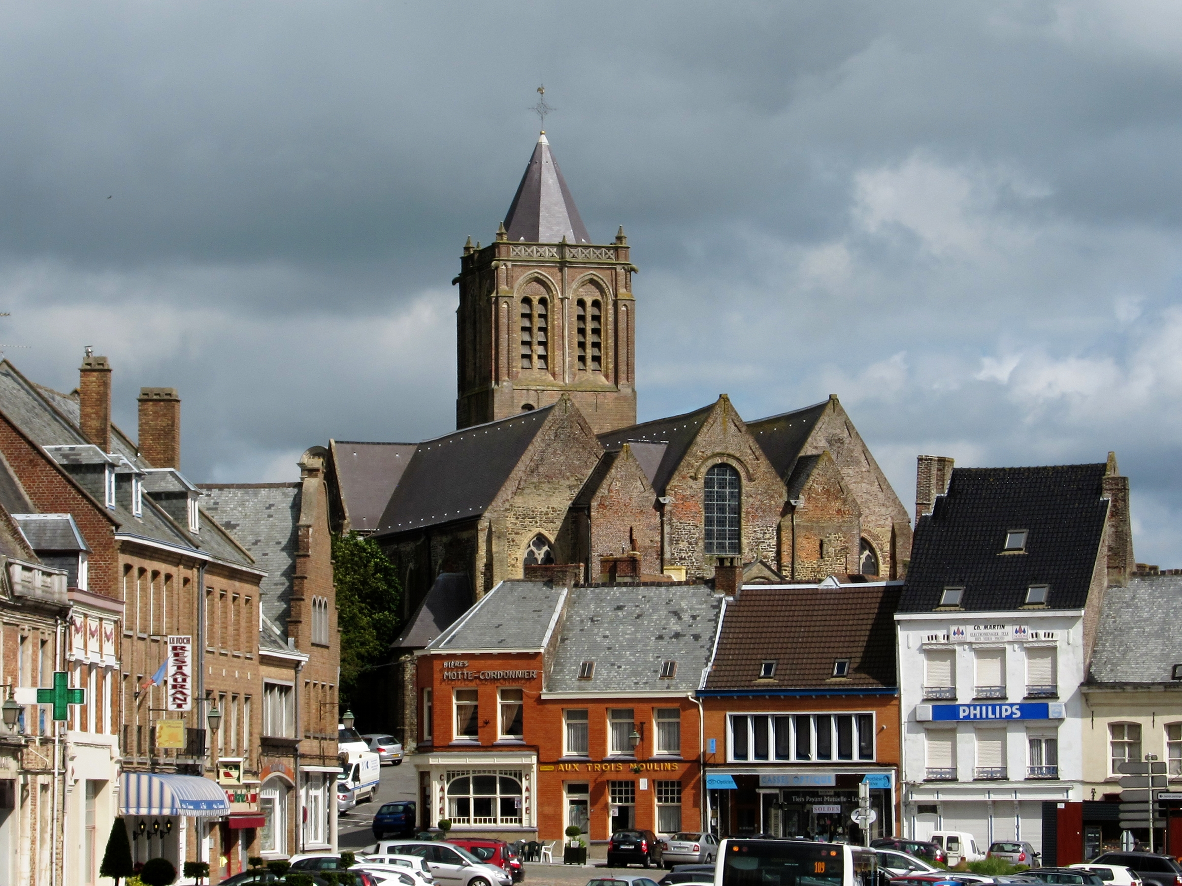 Vue de la Collégiale Notre-Dame à Cassel (Nord).